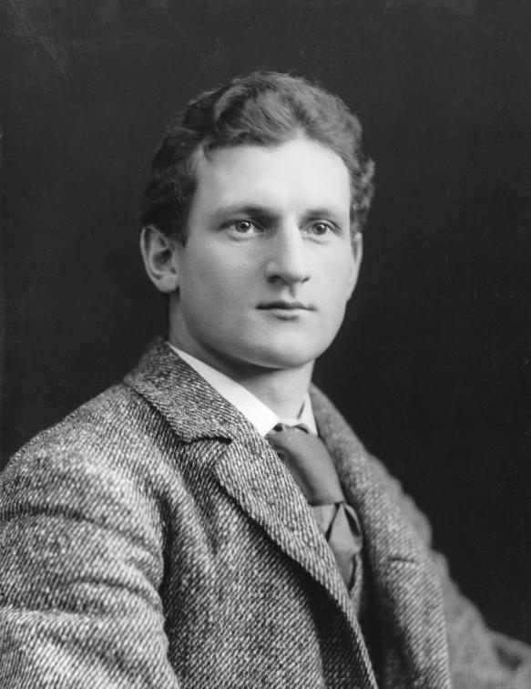 Edward Maxwell, architecte, Montréal, QC, 1893; Photographie - Plaque sèche à la gélatine